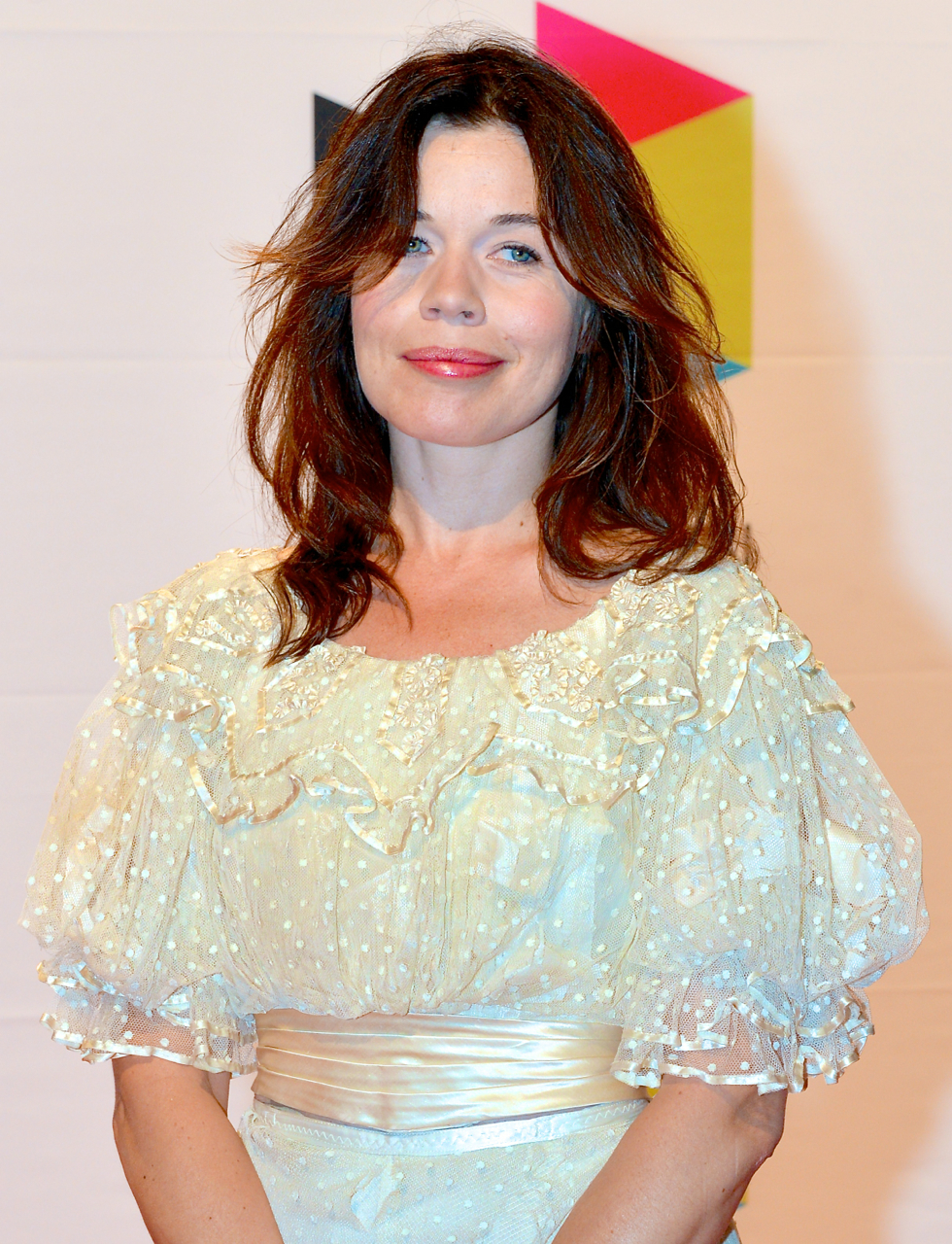 Lotta Lundgren blev en av vinnarna av Kristallen för Årets livsstilsprogram för Historieätarna, på Kristallengalan den 30 augusti 2013.